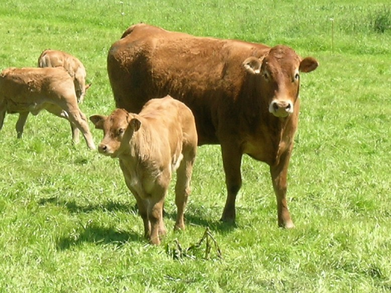 Une vache limousine et son petit veau dans les champs de la ferme de Kerlavic près de Quimper